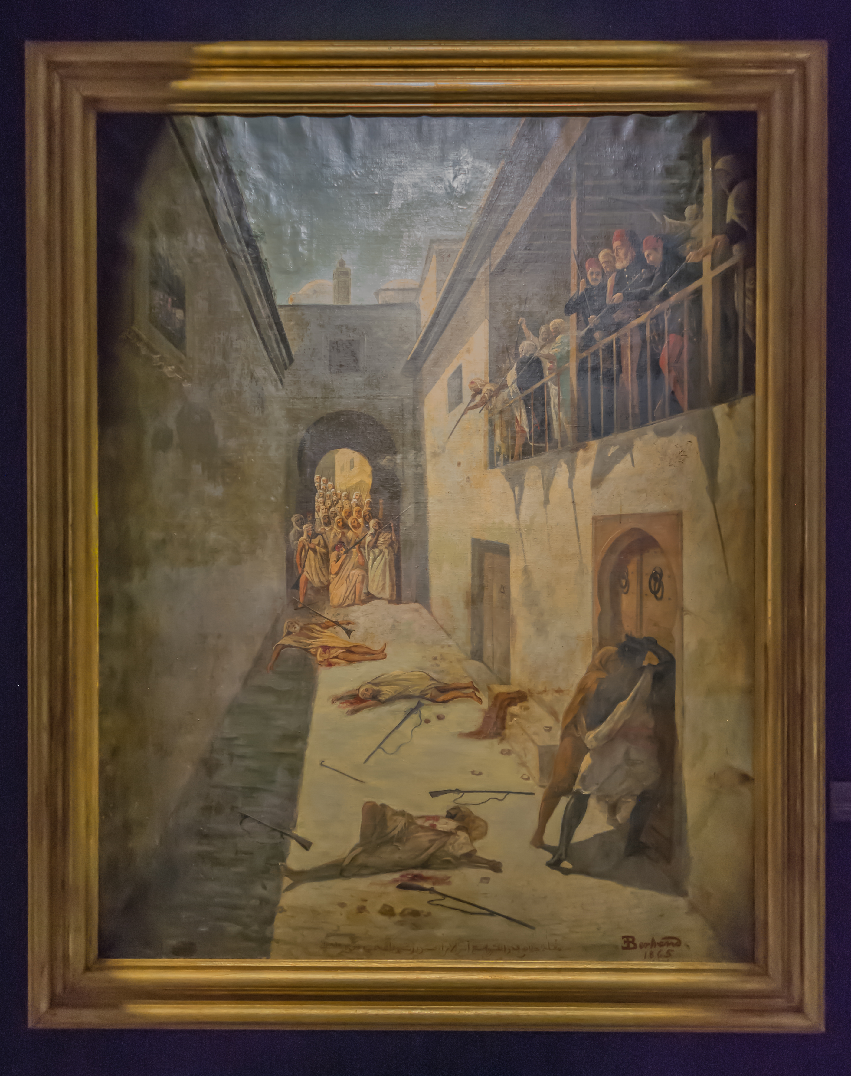 Tuerie des Jlass à Kairouan Tableau illustrant un combat à Kairouan en 1864 entre des membres de la tribu des Jlass au fond de la ruelle et les hommes du général Rachid au balcon Huile sur toile, 115 x 147,5 cm Tunis, musée militaire national, palais de la Rose, inv. 268